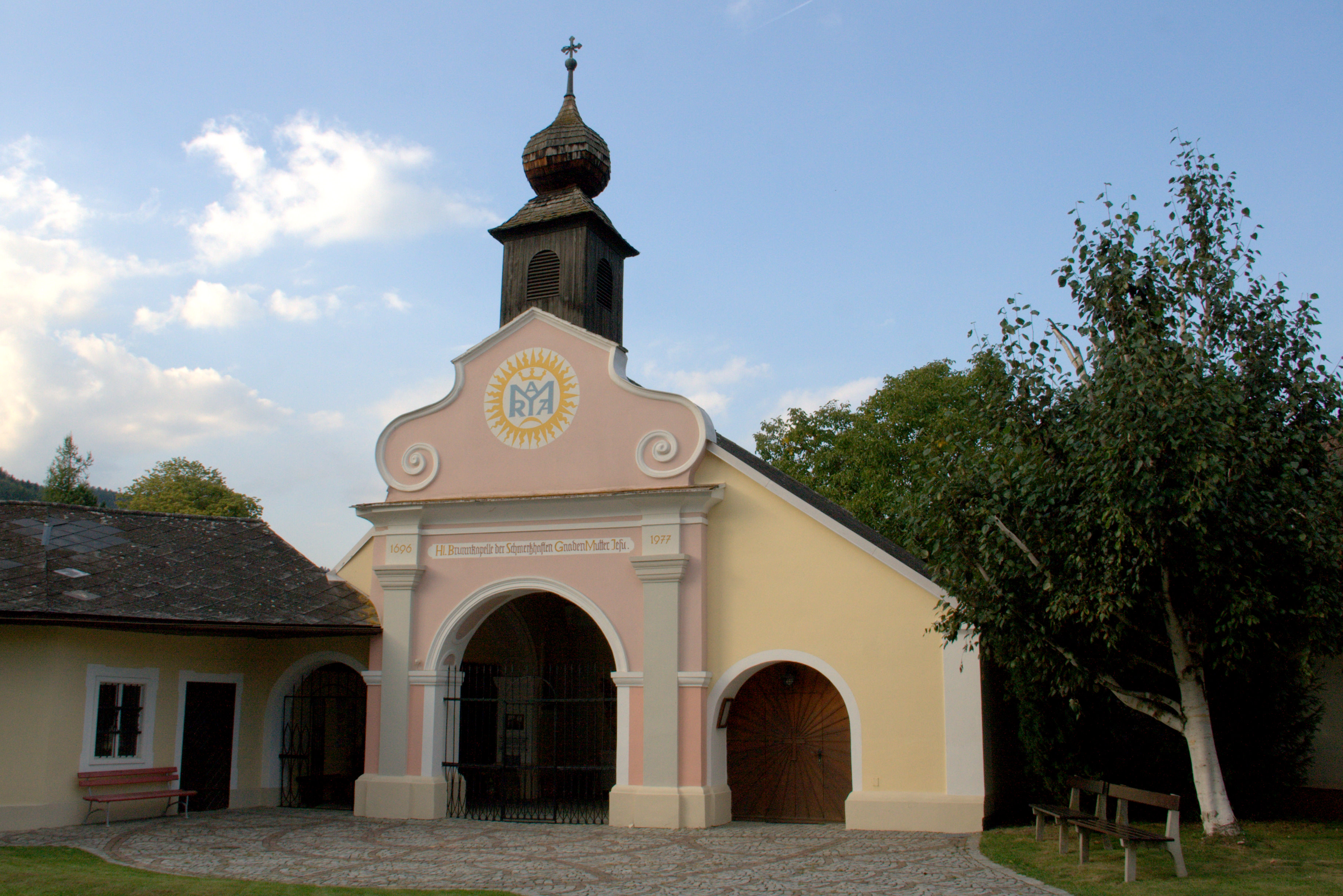 Heiligbrunnkapelle